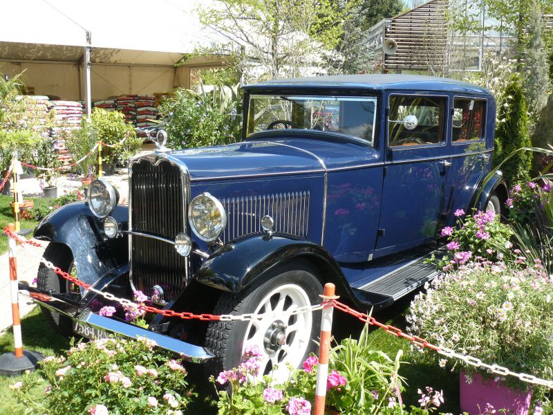 Photo prise le 1er Mai 2012 à Chelles.